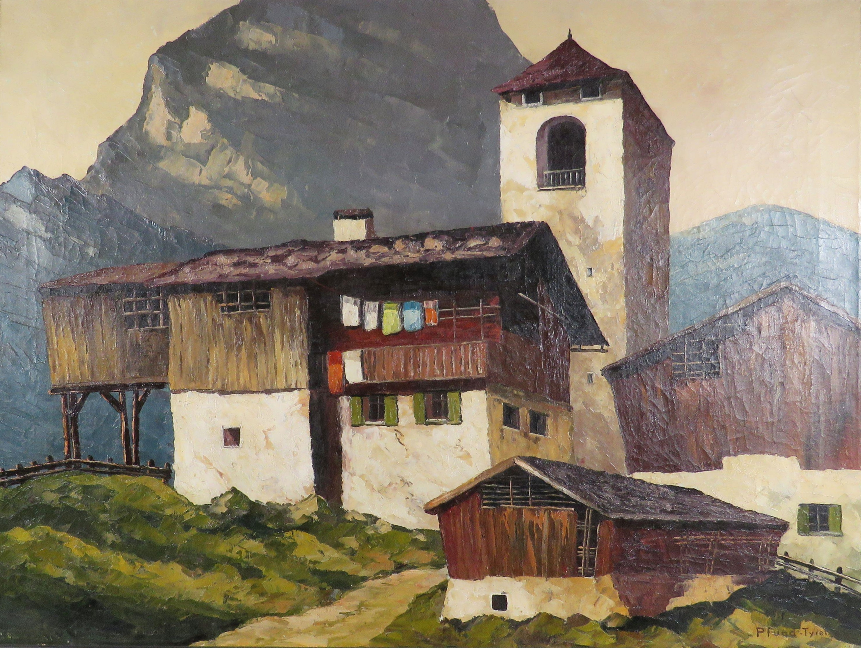 Tiroler Bergdorf, signiert unten rechts: Pfund-Tyrol, Öl auf Leinwand, ca. 60 x 80,5 cm